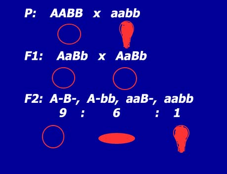 аутор: Снежана Трифуновић